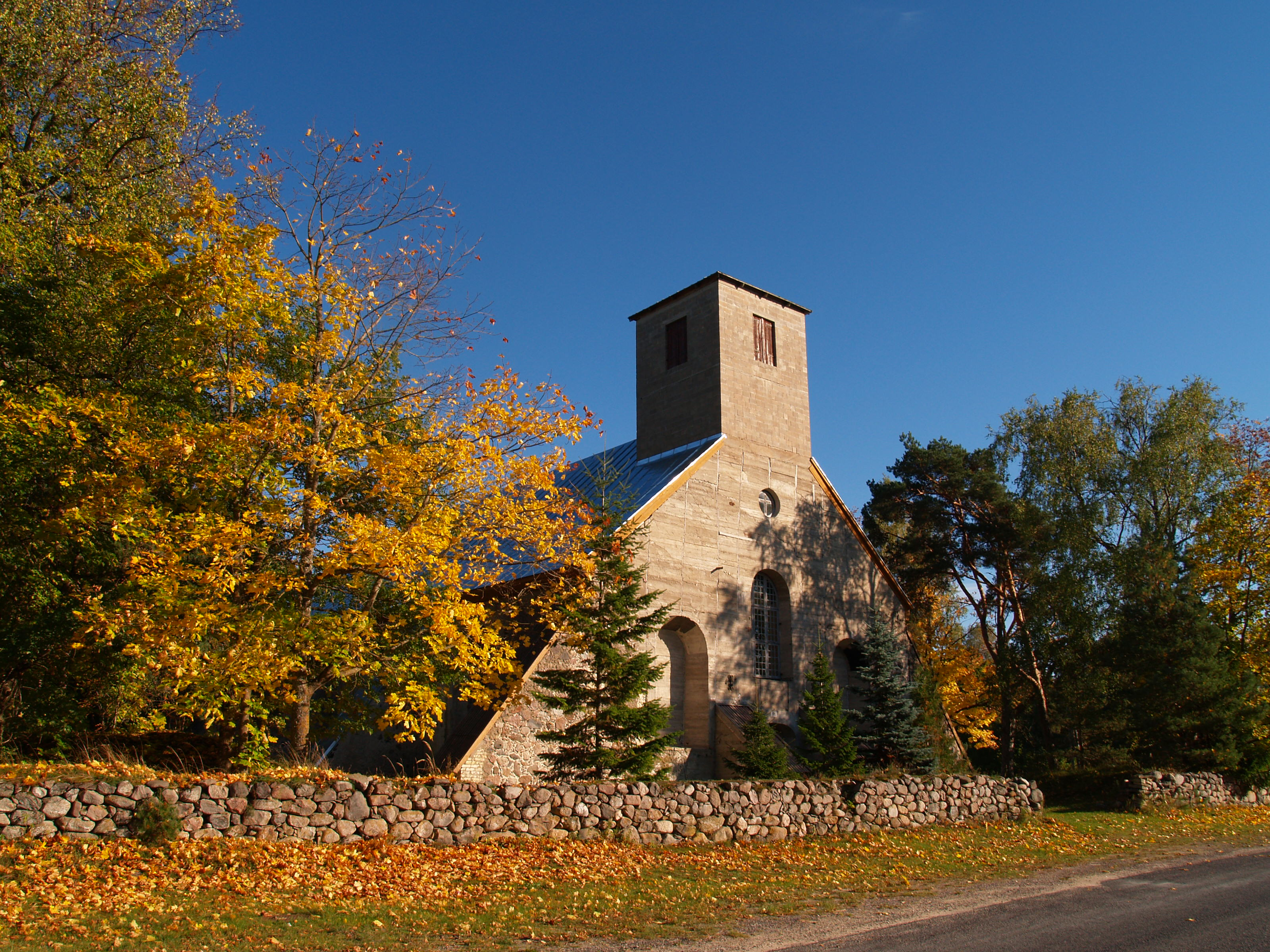 Tõstamaa kirik